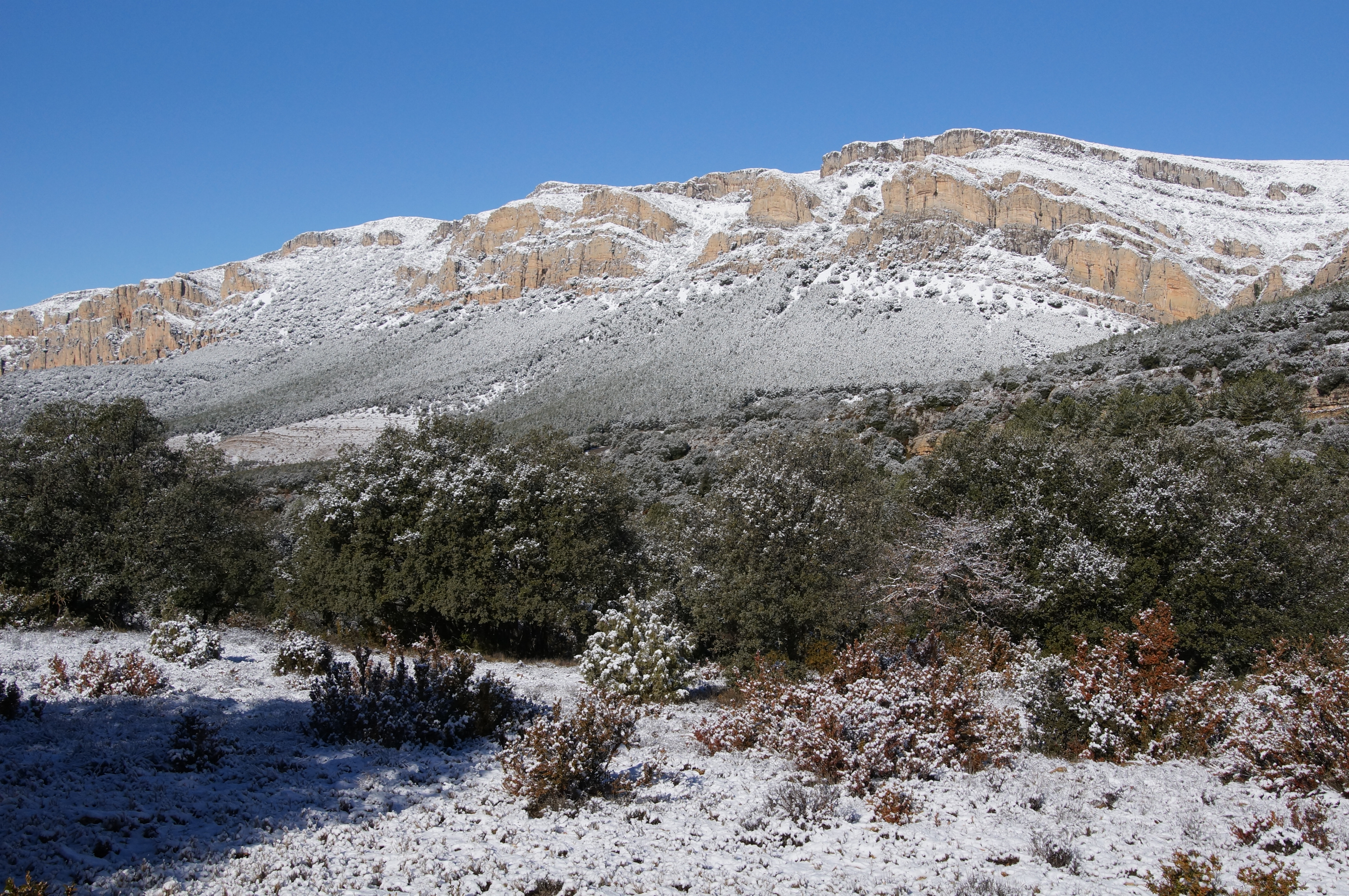 Serra del Montsec d'Ares: Serrat de la Corona This is a a photo of a natural area in Catalonia, Spain, with id: ES510192